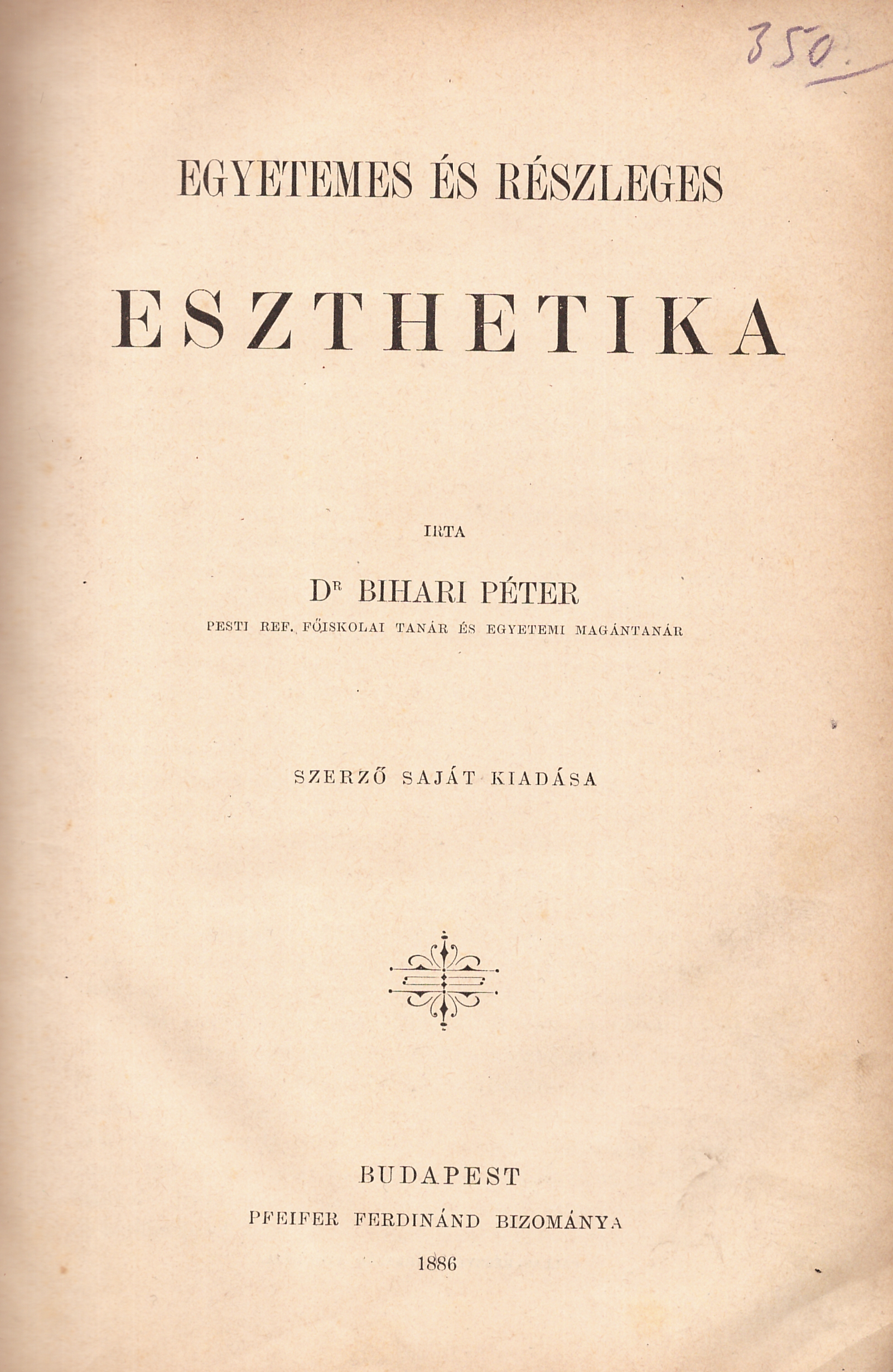 Bihari Péter (1840-1888): Egyetemes és részleges eszthetika (saját készítésű kép)